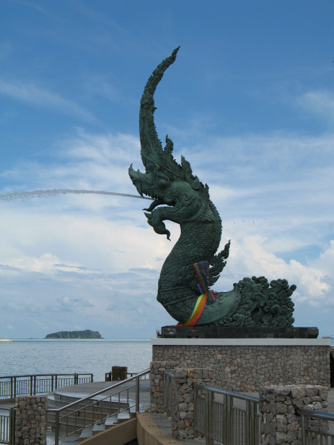 Naga Head at Song Thale Park, Songkhla City.